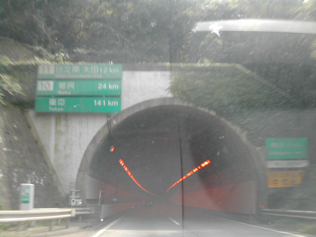 SukegawaTN,ibaraki,Japan